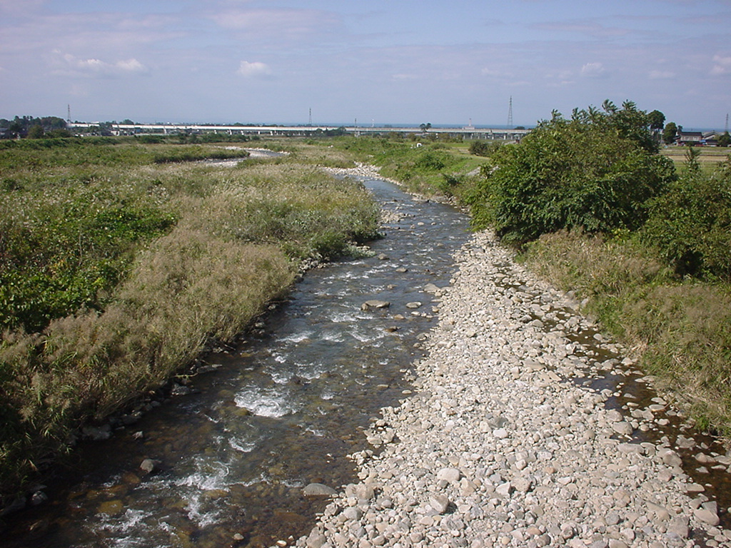 Ogawa River in Toyama, Japan. ja: 小川（富山県下新川郡朝日町長野 新川小川橋より下流方向撮影）